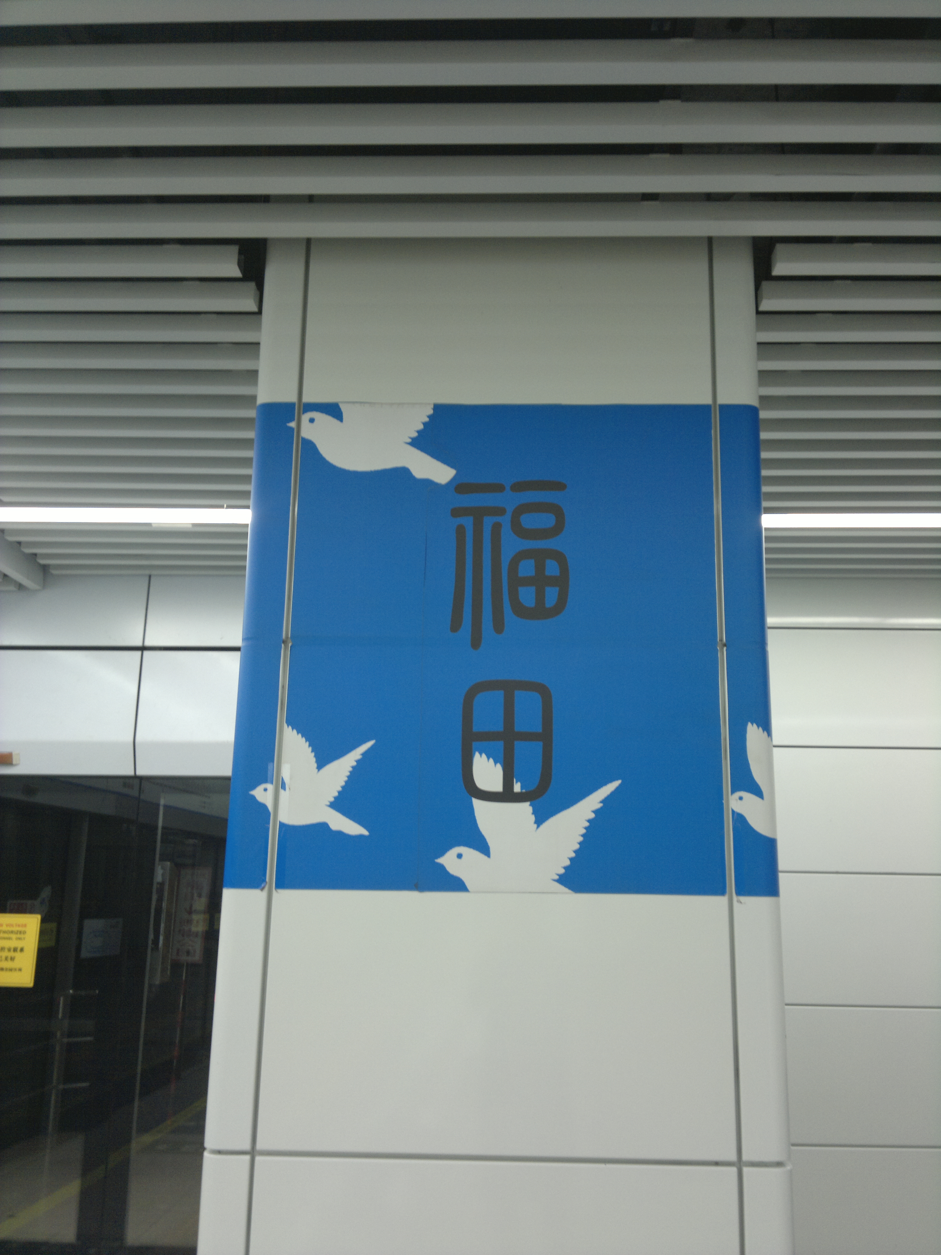 3号线站台立柱